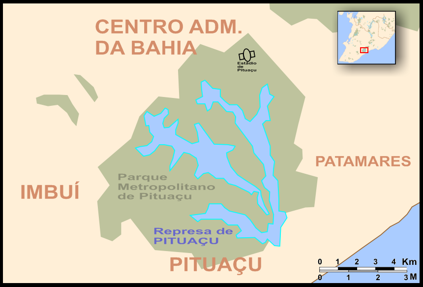 Mapa de Salvador (Bahia, Brazil) - Parque Metropolitano de Pituaçu, represa e Centro Administrativo da Bahia.